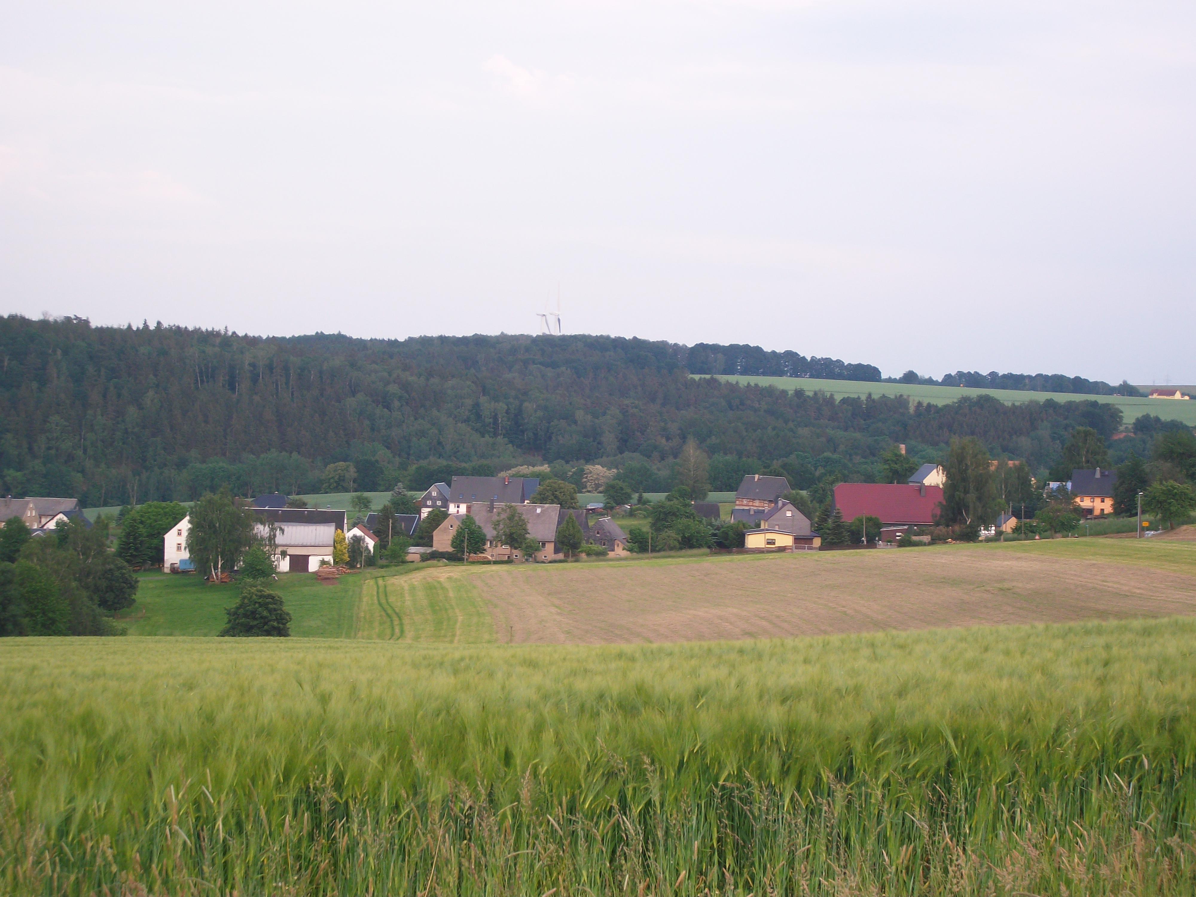 Blick auf Kockisch